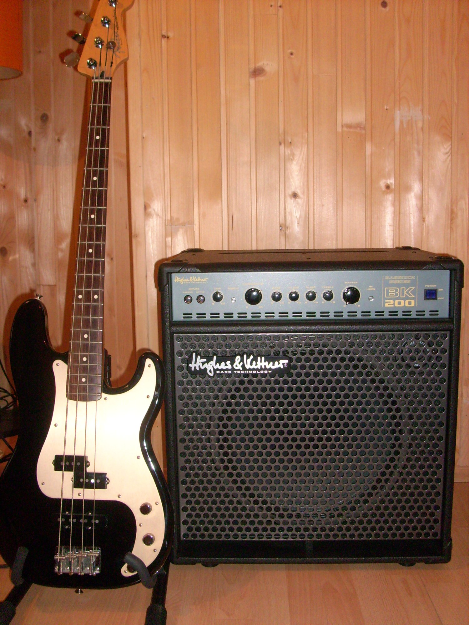 BassKick 200w